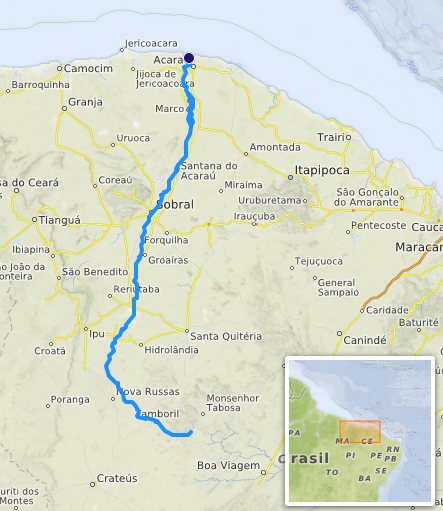 carte réalisée sur umap [1] This map may be incomplete, and may contain errors. Don't rely solely on it for navigation.